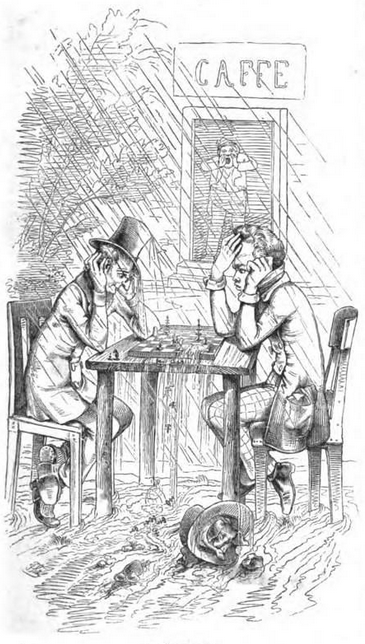 Illustration aus Fliegende Blätter, Bd. 1, Heft 19, S. 151